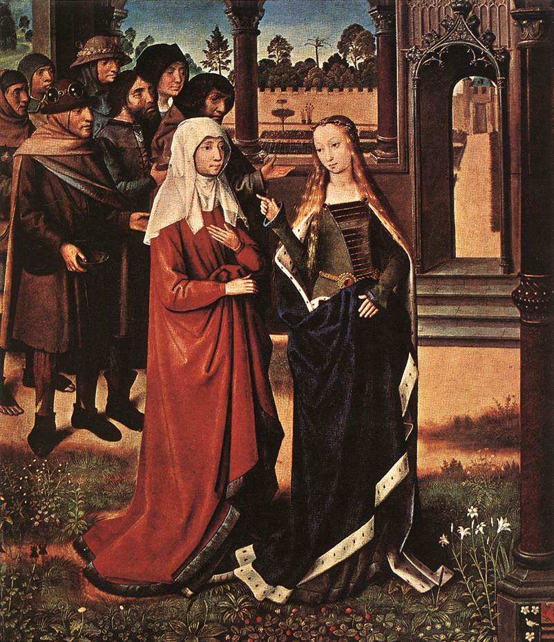 Lucia en haar moeder met een groep bedelaars en pelgrims